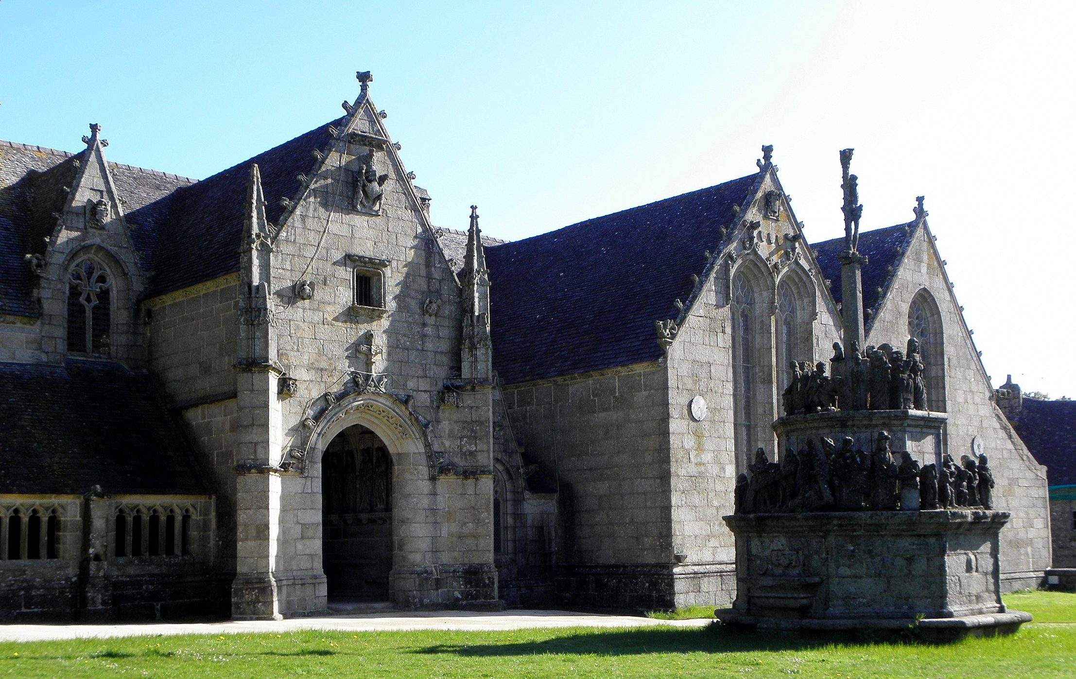 Calvaire et flanc sud de l'église N.D. de Kergrist-Moëlou (22).